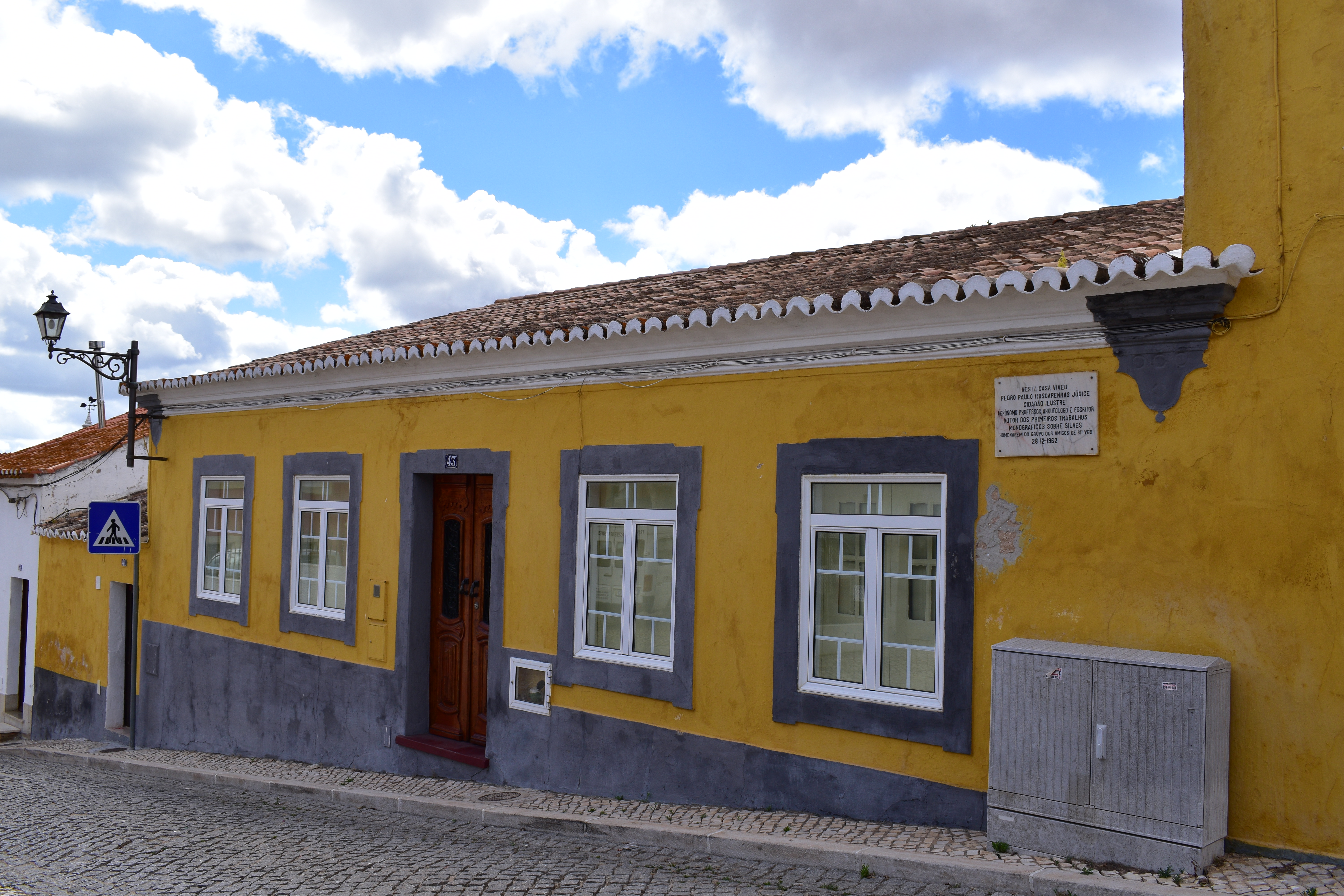 Casa onde viveu Pedro Paulo Mascarenhas Júdice, agrónomo, professor, arqueólogo e escritor, tendo sido responsável por alguns dos primeiros trabalhos relativamente à monografia de Silves.